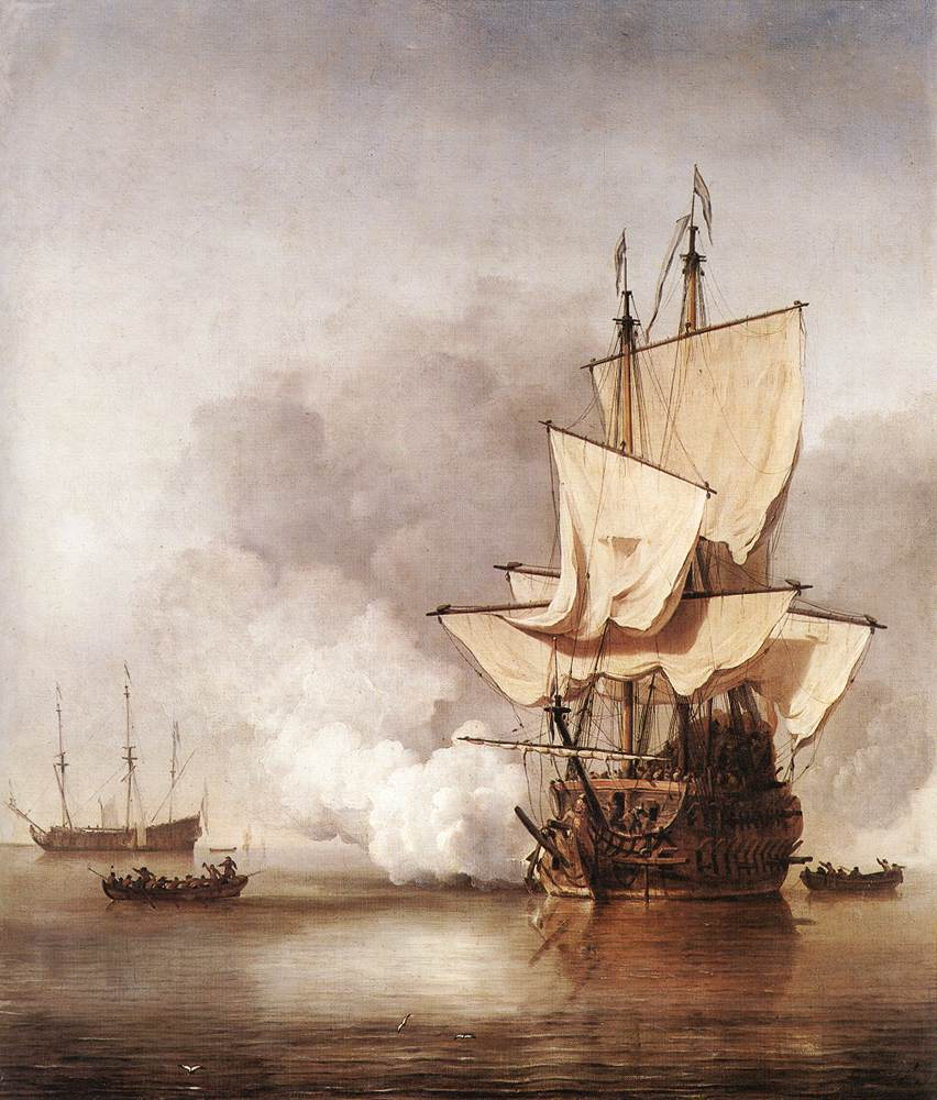 Pendant of File:De Windstoot - A ship in need in a raging storm (Willem van de Velde II, 1707).jpg.